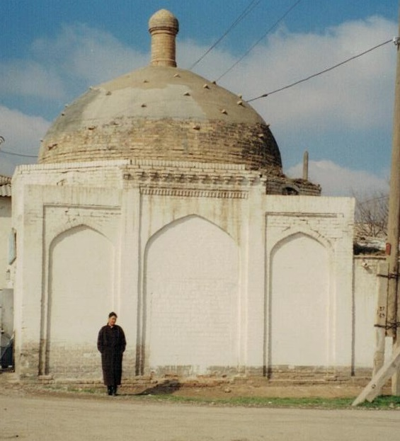 Гузар. Узбекистан. 2000